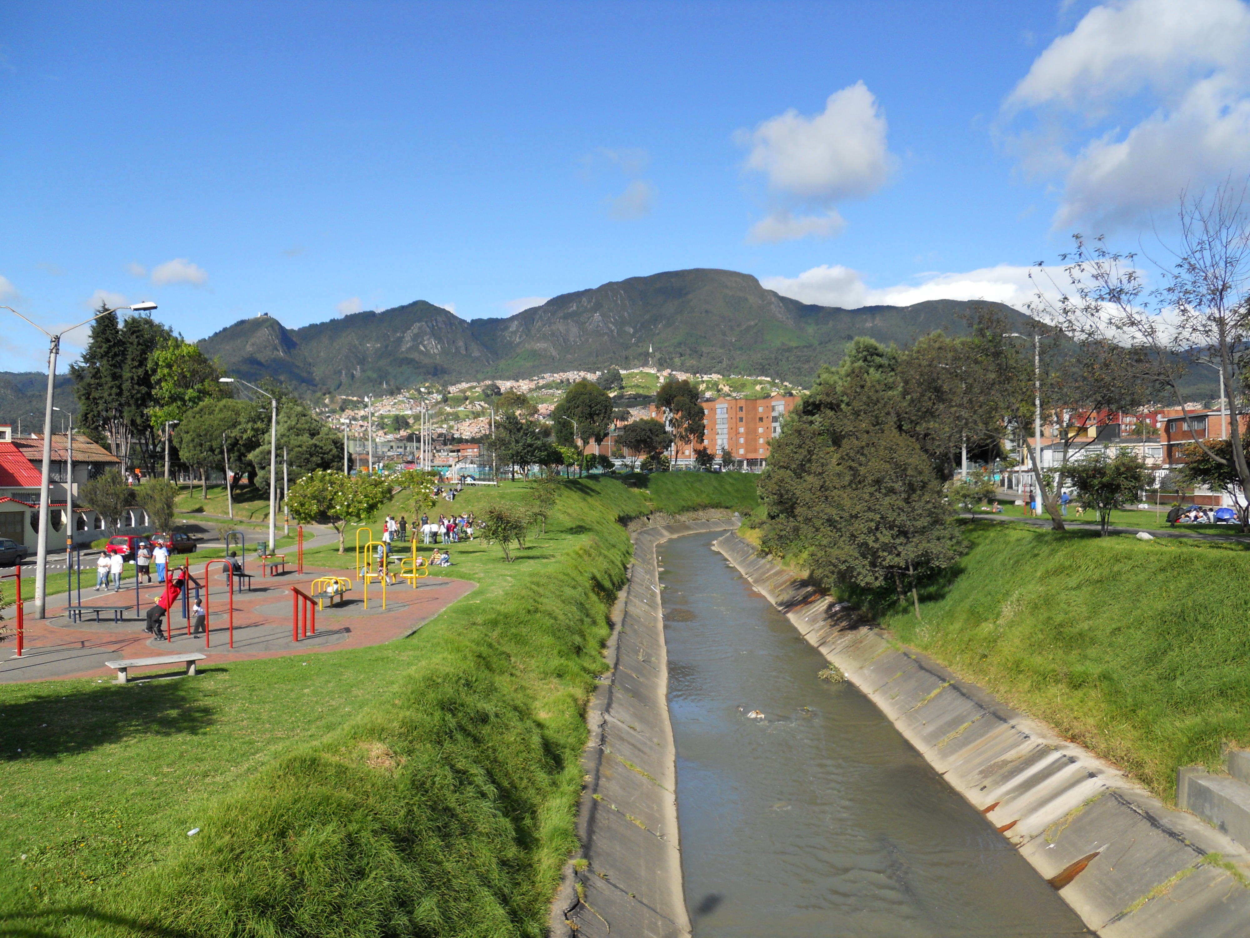 Bogotá, río Fucha hacia la carrera Doce, en la localidad Antonio Nariño.